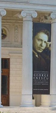 Affiche du Festival International Georges Enesco devant l'Athénée Roumain de Bucarest, septembre 2005